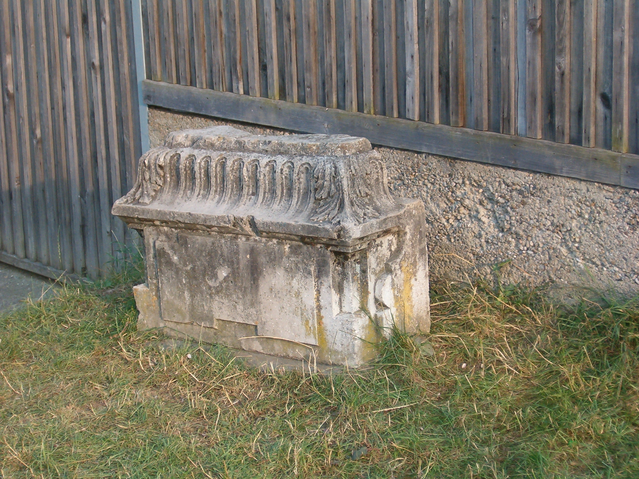 Kő a fehéregyházai Sár-patak hídjának lábánál, Segesvár környékén. A hagyomány (és egyes visszaemlékezések) szerint erről a helyről nézte Petőfi a segesvári csatát